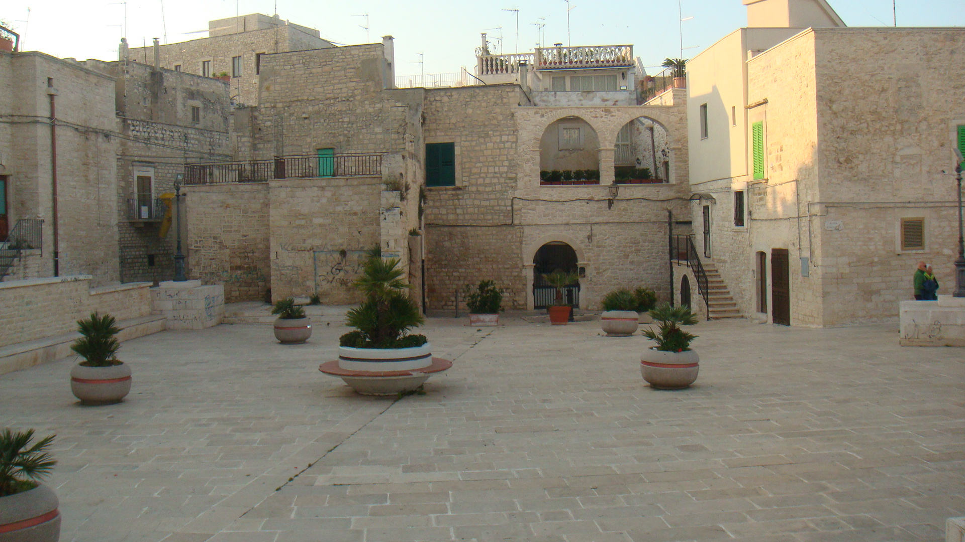 Piazza San Salvatore